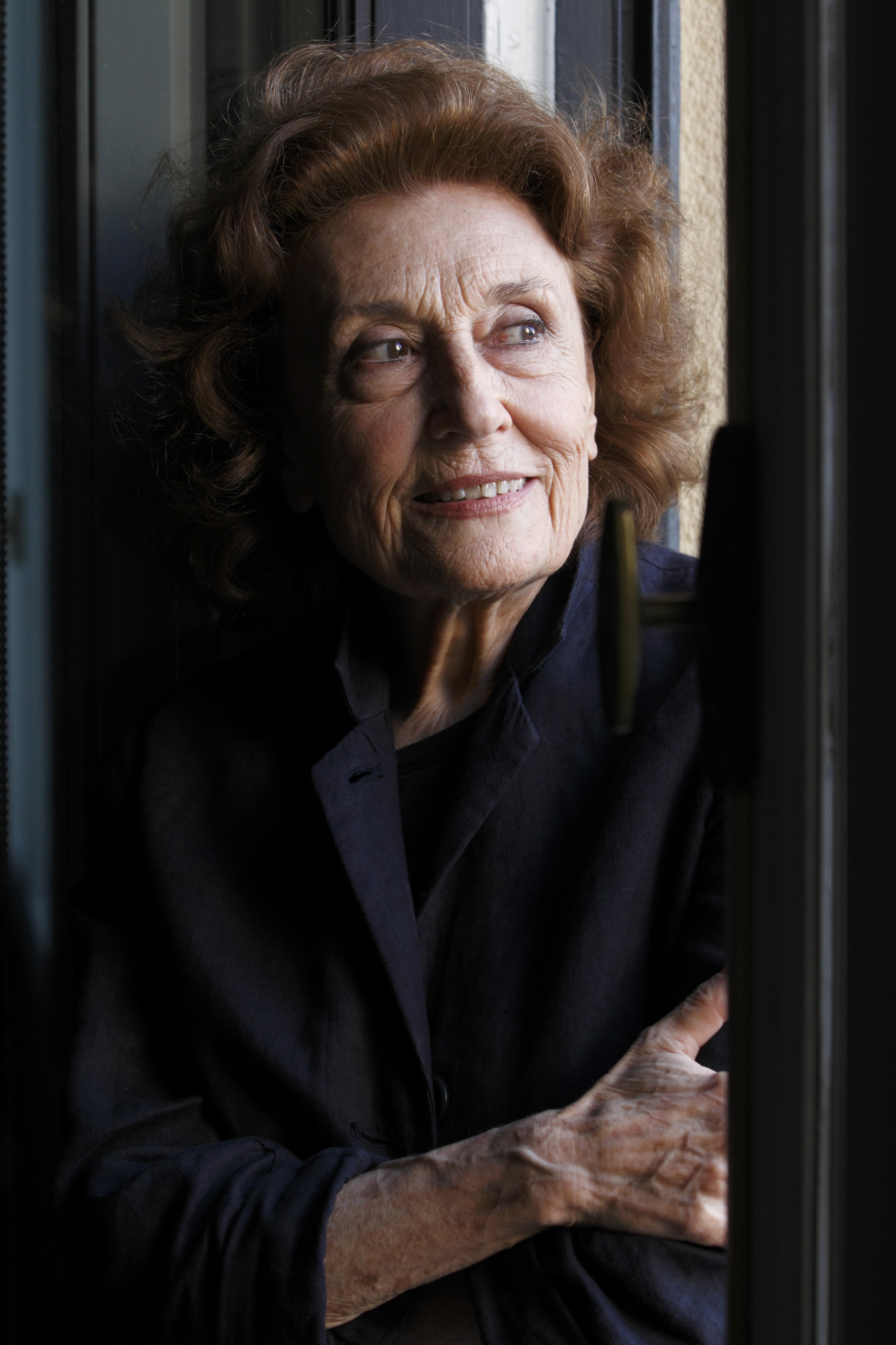 Julia Gutiérrez Caba 14º Premio Corral de Comedias © Enrique Cidoncha